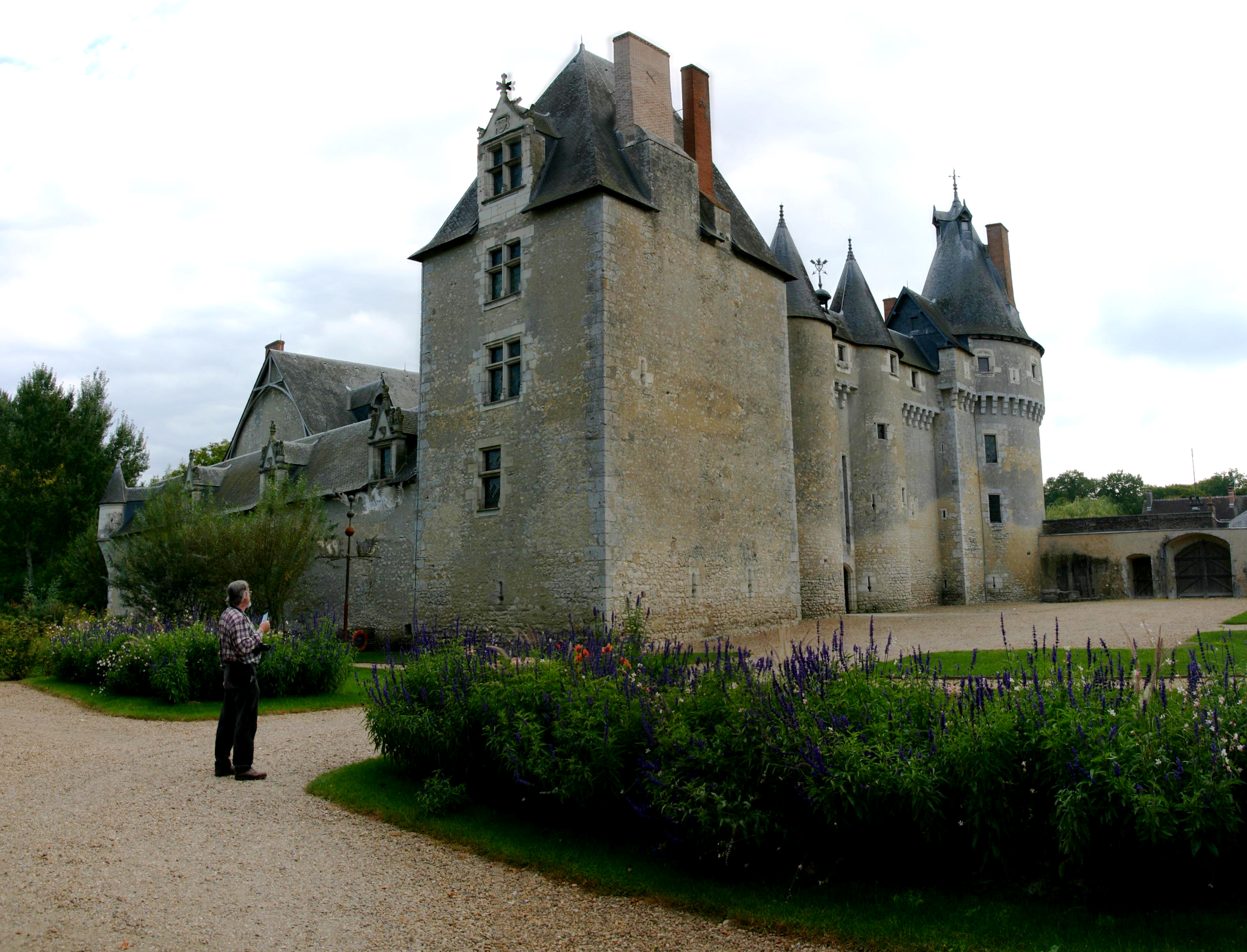 Schloss Fougères-sur-Bièvre